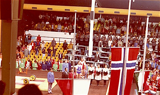 Siegerehrung Gewichtheben, Leichtschwergewicht, Olympische Spiele 1972 in München. Sieger: Leif Jensen, Norwegen